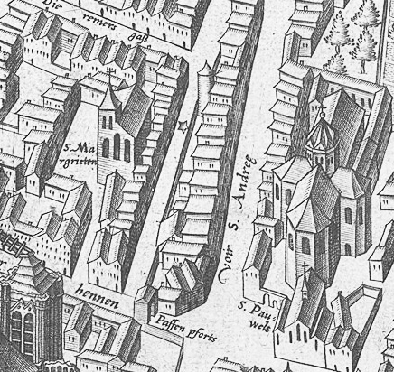 Ausschnitt des Mercator – Stadtplanes Köln. Bereich „Nordwesten des Doms, Nordtor (Pfaffentor) und erster Turm der Burgmauer”